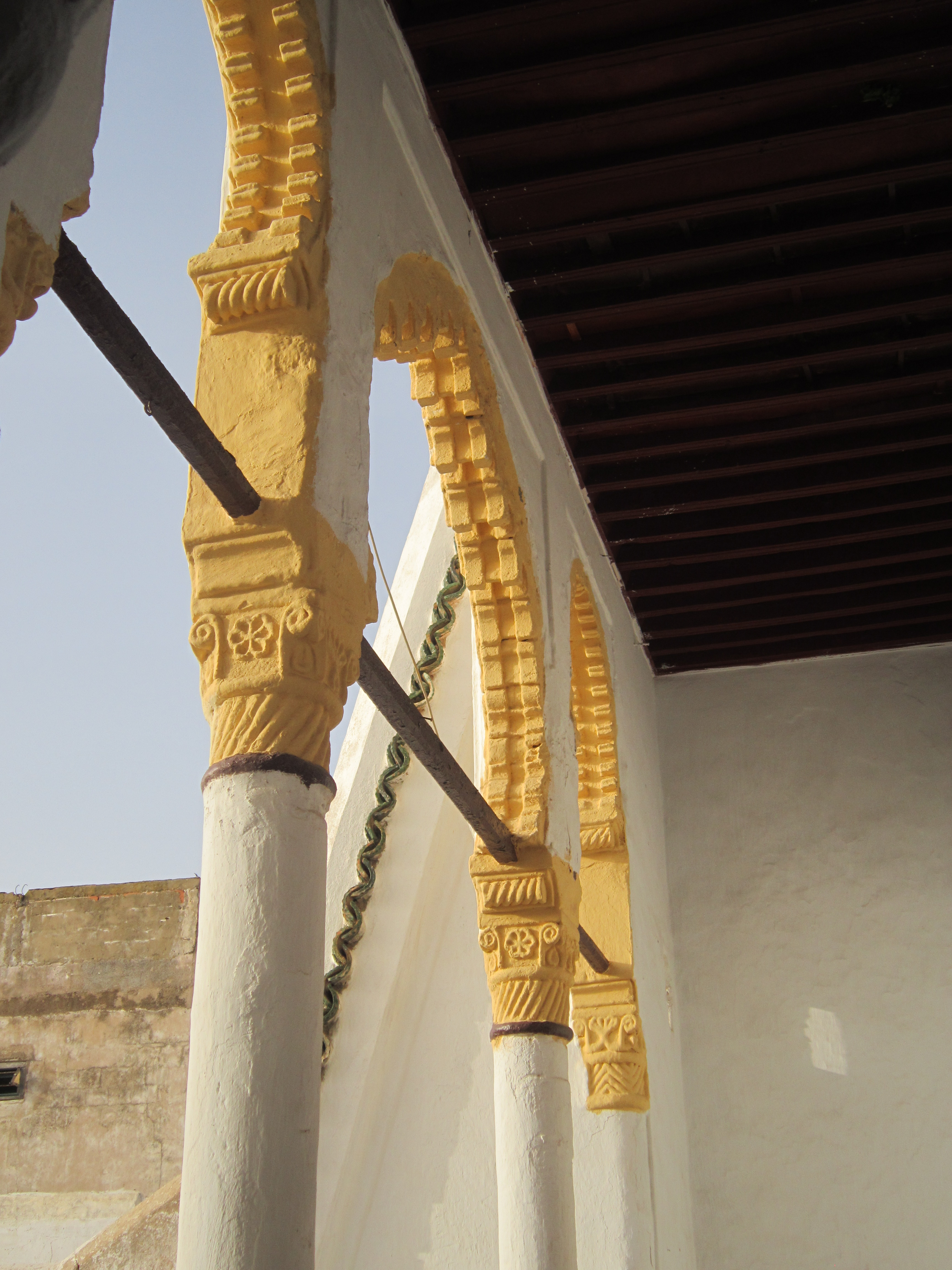 Arcs à lambrequins dans la maison hispano-mauresque de la famille Benkhadra à Salé